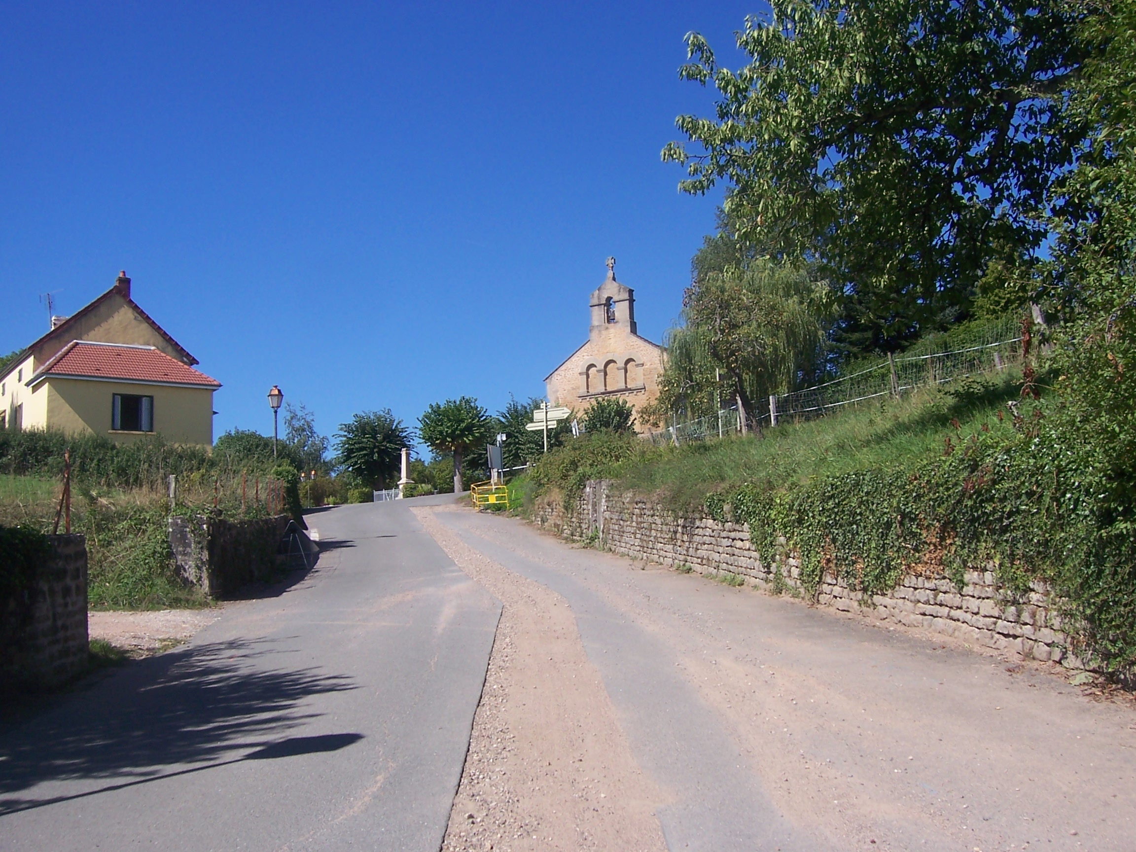 Eglise de Saint-Maurice-lès-Couches